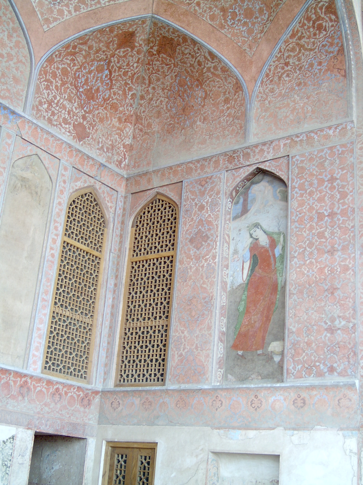 A mural in Ali Qapu Palace, Esfahan,Iran.